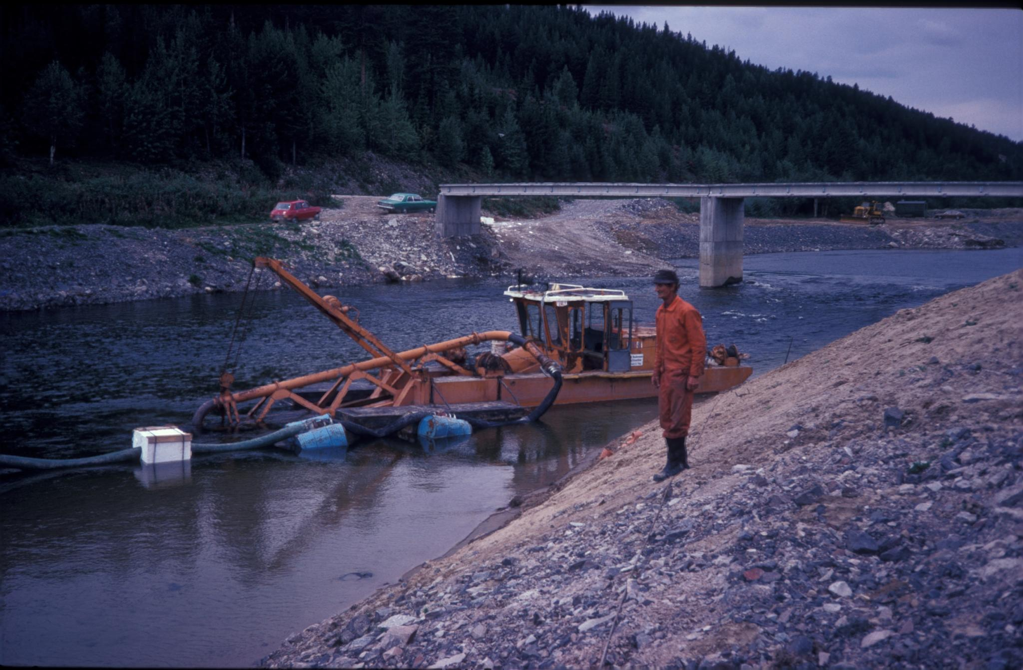 Kanaliserte elver, anleggsarbeidere, båter, anleggsarbeider, bruer. Hydrologisk arkiv. Dato: 1980-05-06